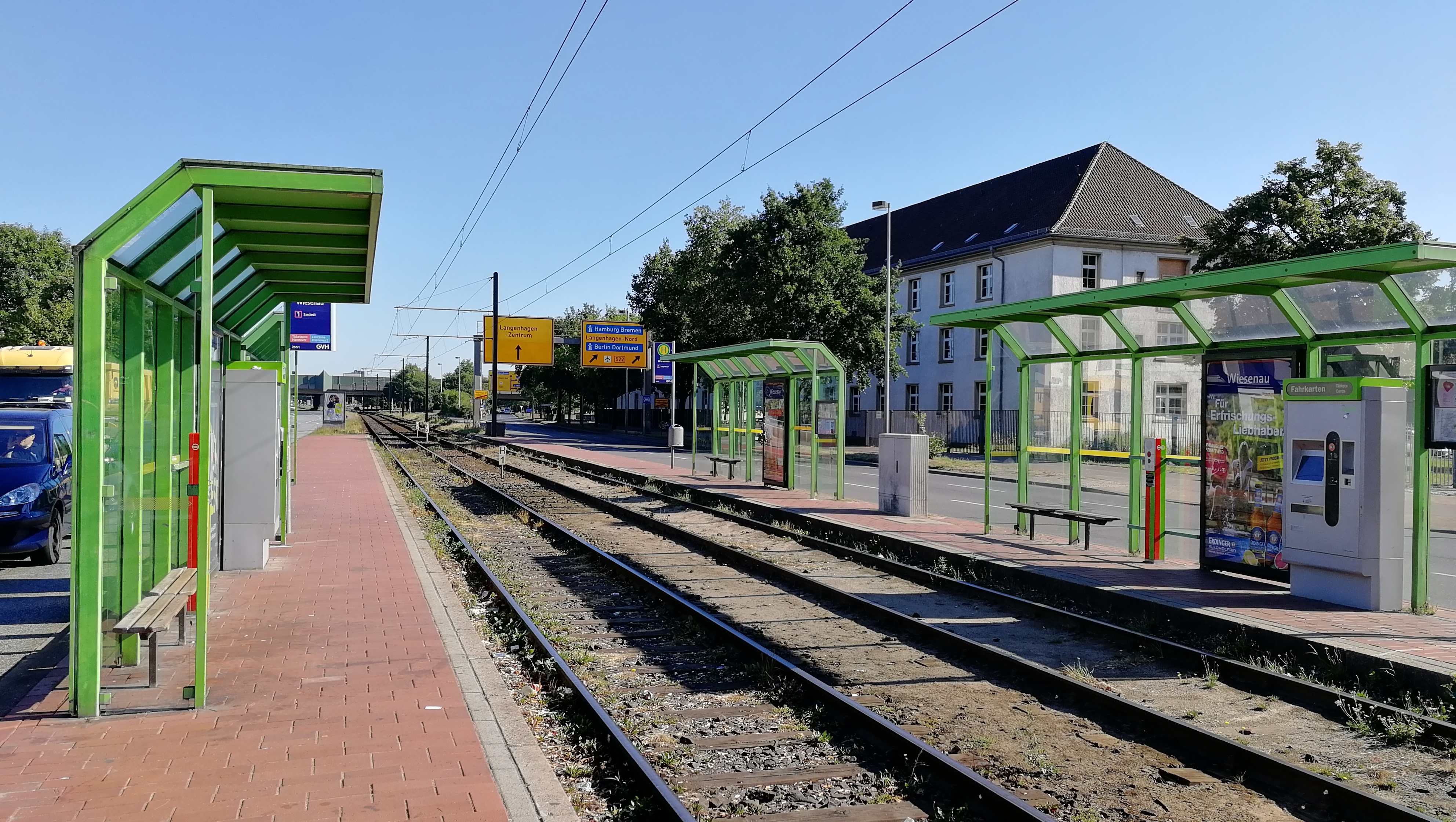 Stadtbahn Hannover, Haltestelle: Wiesenau